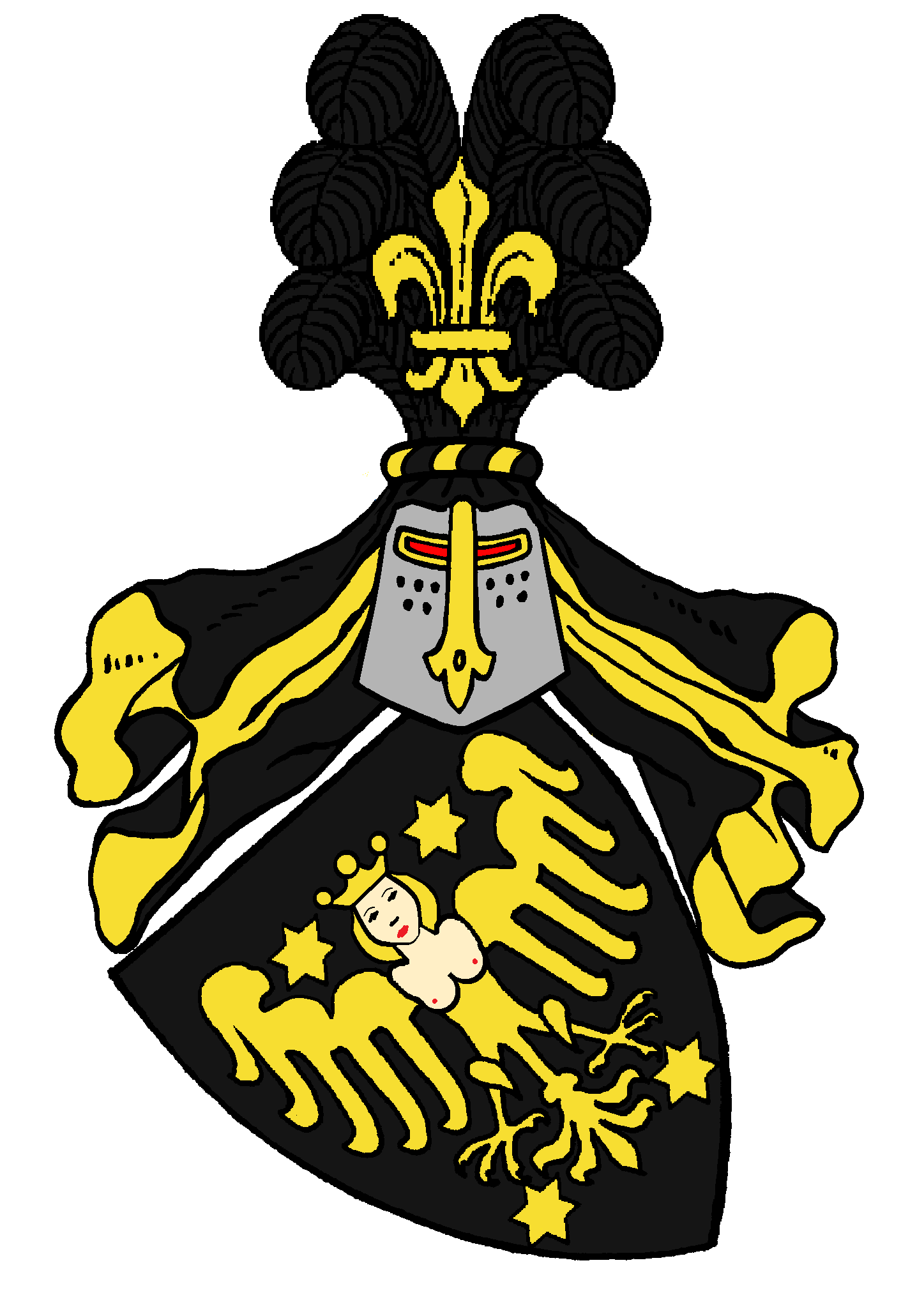 Wappen der Cirksena, seit 1454 Reichsgrafen von Ostfriesland, seit 1581 auch von Rietberg